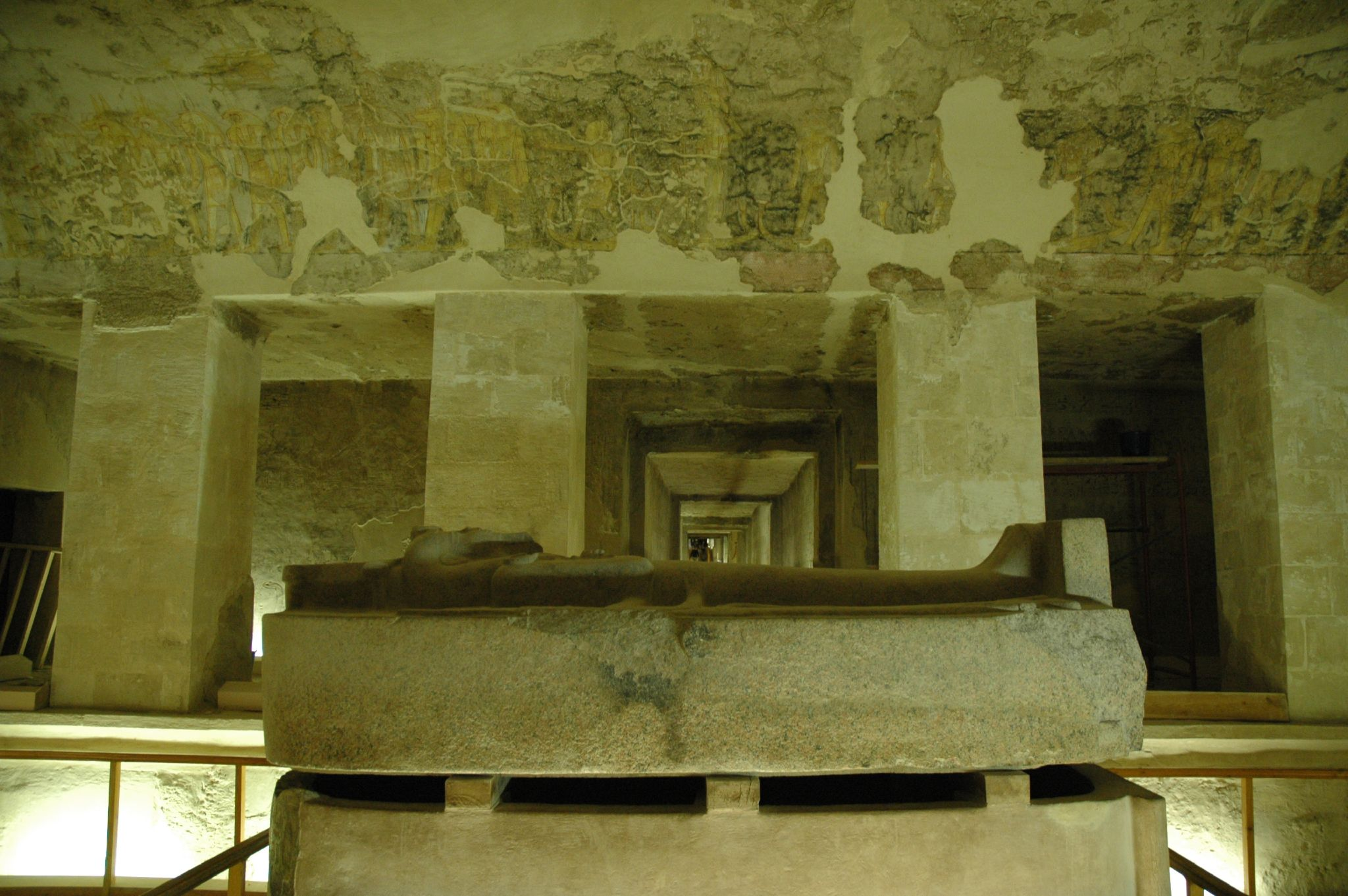 il sarcofago de Setnakht, re della XX dinastia (sarcophagus of Setnakht)